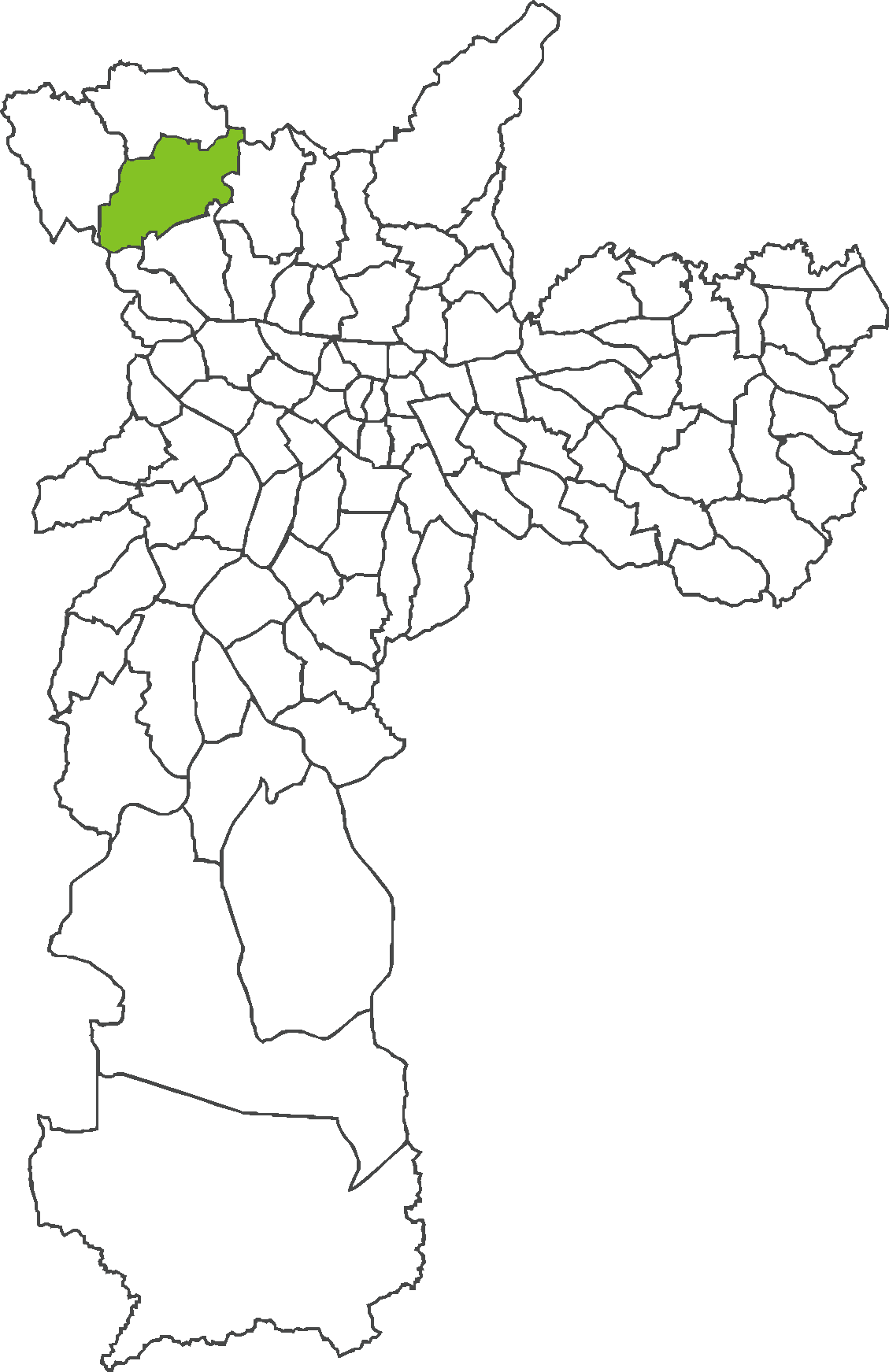 Localização do distrito de Jaraguá no município de São Paulo.